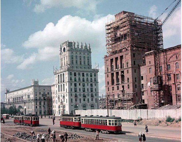 Ворота Минска, Привокзальная площадь, Минск, середина 50-х годов XX века